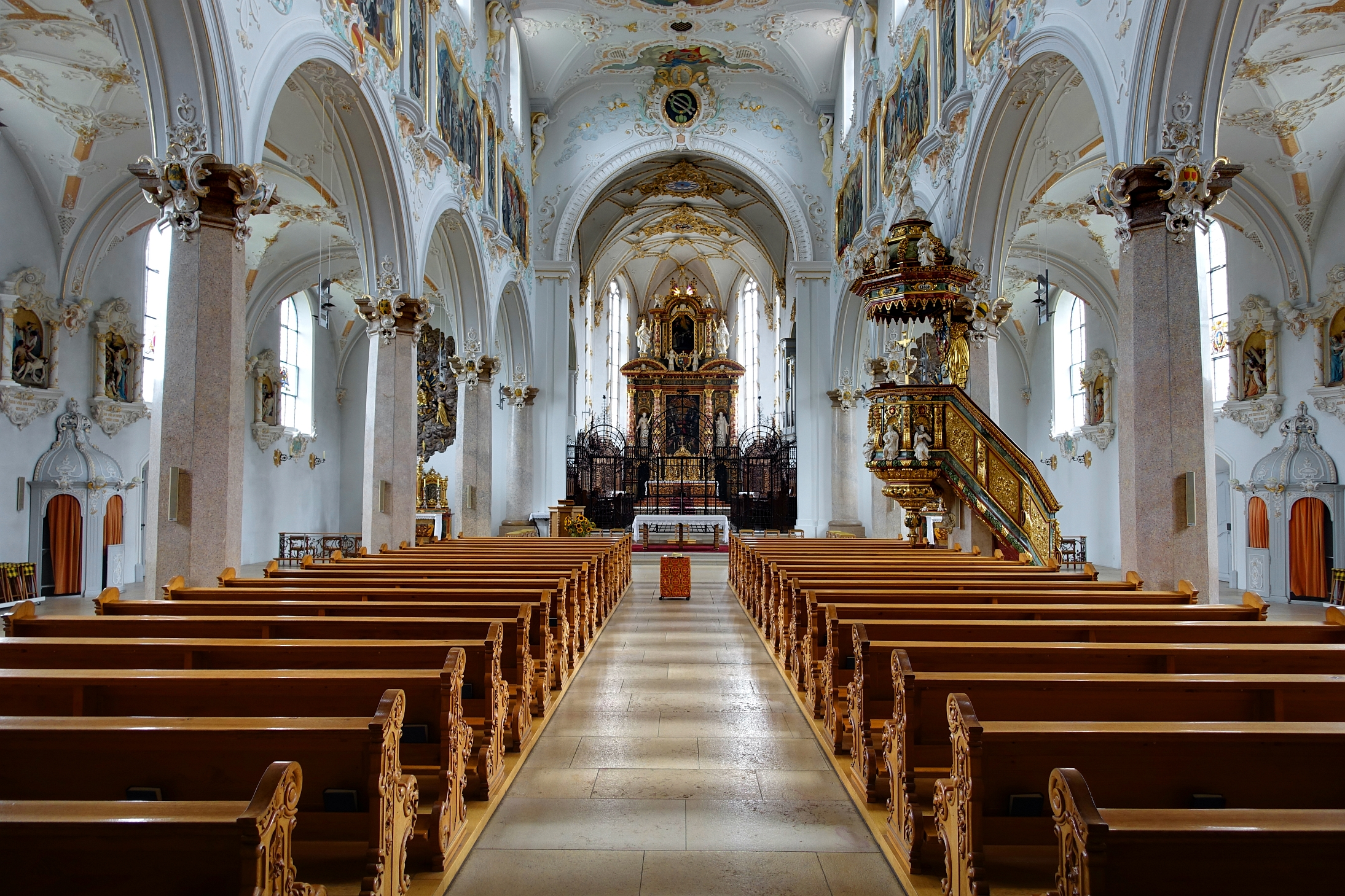 Innenraum des Kloster Mariastein